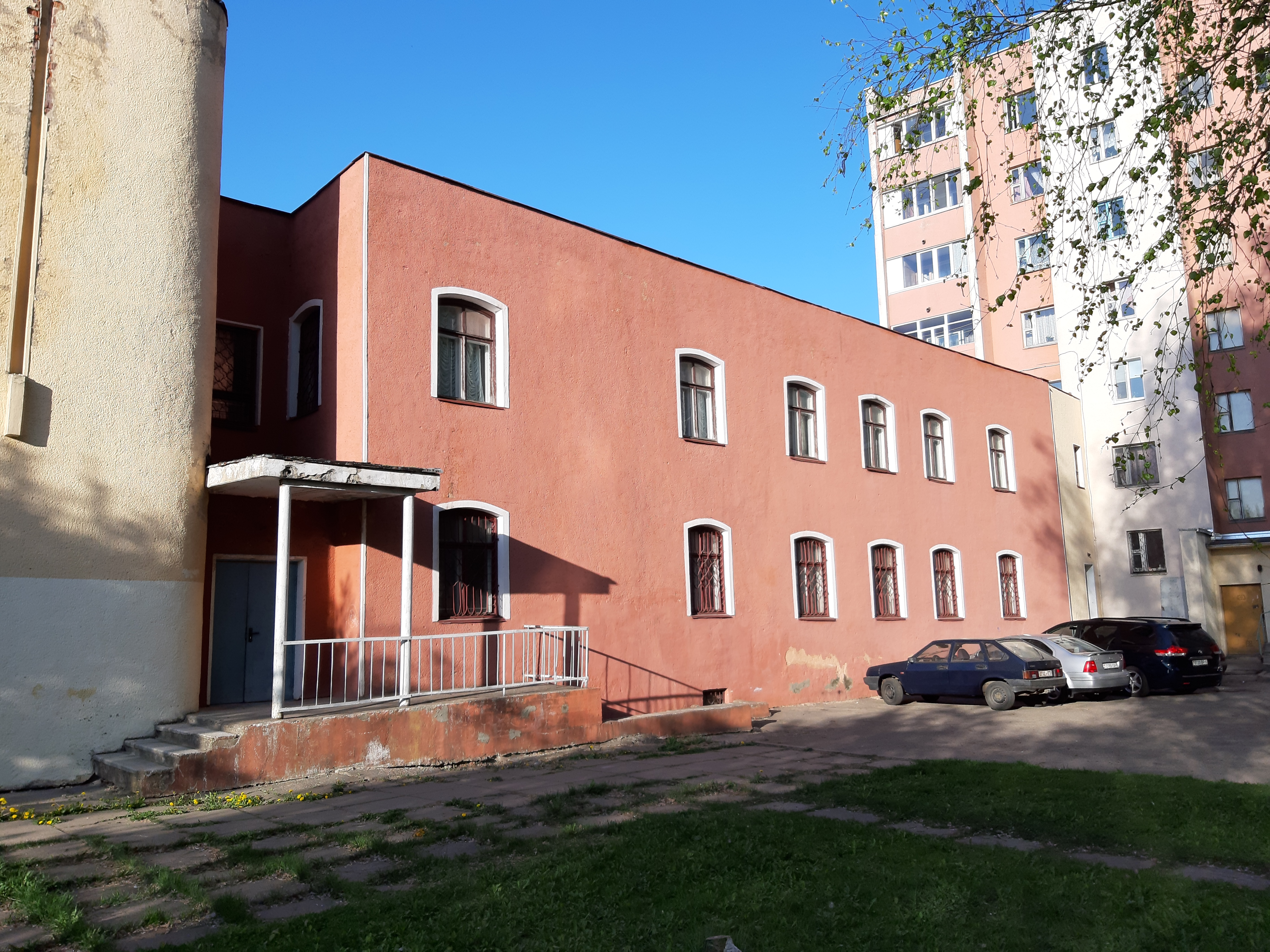 Магілёў. Каля этнаграфічнага музея